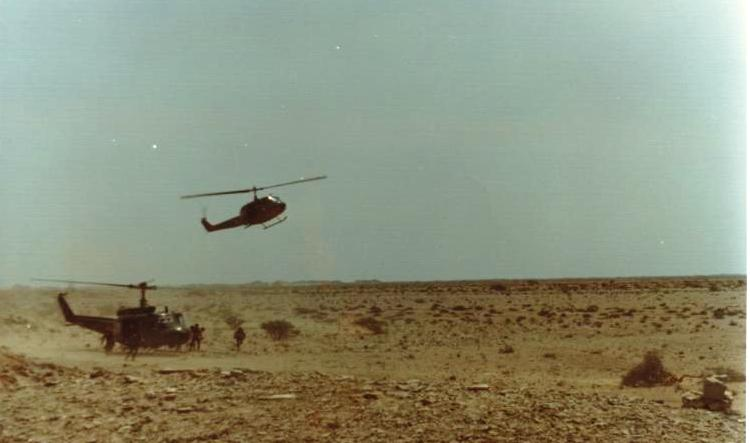 Oman 1980